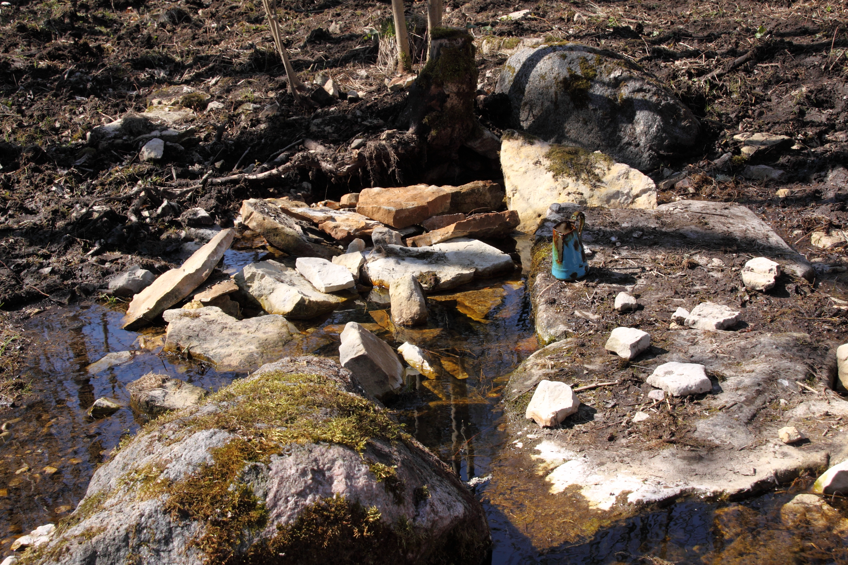 Kurese allikas 2010 aasta aprillis, mil allika ümbrust toestanud kivid olid maastikusõiduvahendiga puruks sõidetud ning allika ilme rikutud.